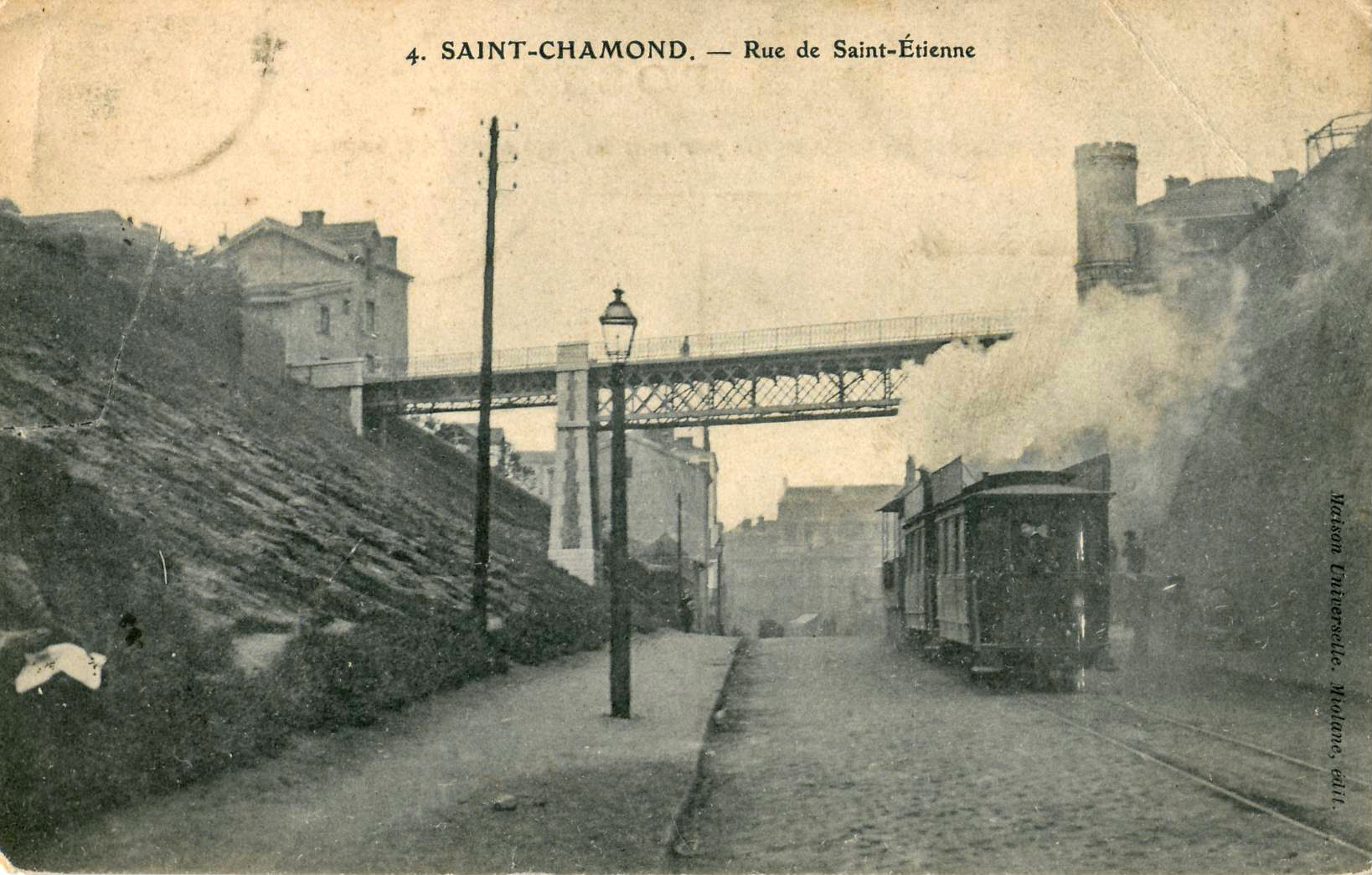 Carte postale ancienne éditée par Maison Universelle, Miolane, n°4 : SAINT-CHAMOND - Rue de Saint-Étienne